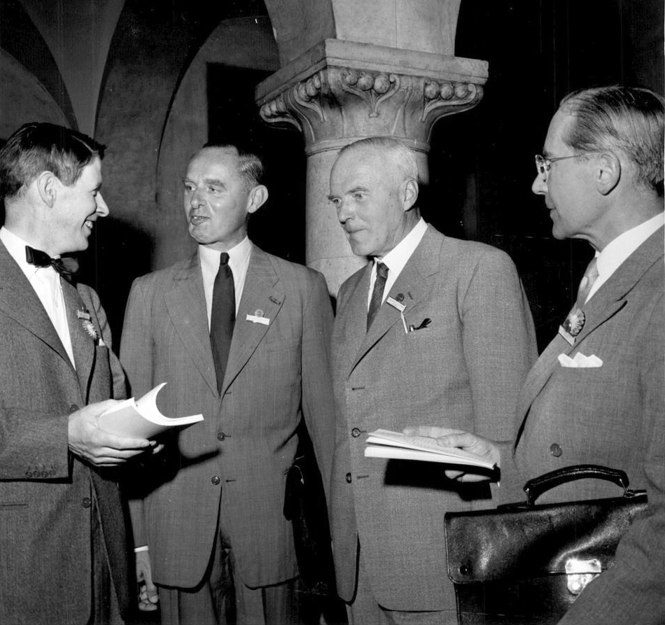 Professor Seve Ljungman, vicepresidenten G. H. C. Bodenhausen, Nederländerna, och kongressens president disponent Christian von Sydow diskuterar rättsskyddsproblem. Hur man skall skapa bättre skydd för kemiska produkter och på laglig väg kunna skydda nationella varumärken mot illojala efterapningar är de två huvudproblem som kommer upp för diskussion på Internationella föreningens för industriellt rättsskydd (AIPPI) femdagarskongress, som öppnas i Stockholm av av riksmarskalk Birger Ekeberg på tisdagen. Stockholmskongressens huvudsyfte är annars att förbereda diplomatkonferensen i Lissabon de 6 oktober.